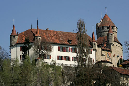 Lucens: Château (privé)